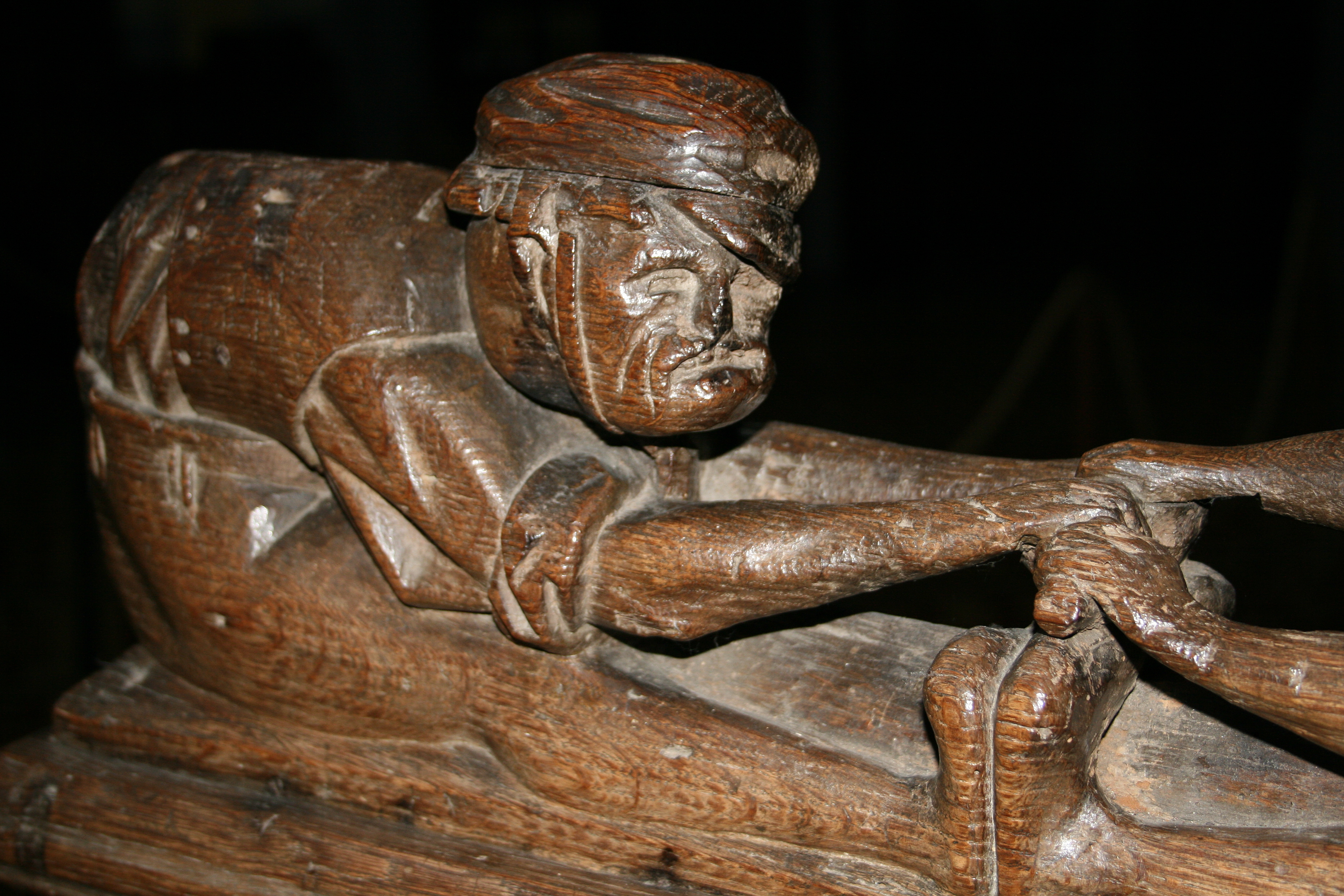 Détail d’un groupe sculpté ornant une parclose et représentant la satire du jeu de la pannoy (jeu médiéval). - Stalles de la Basilique Saint-Materne (XVIe siècle) - Walcourt (Belgique).